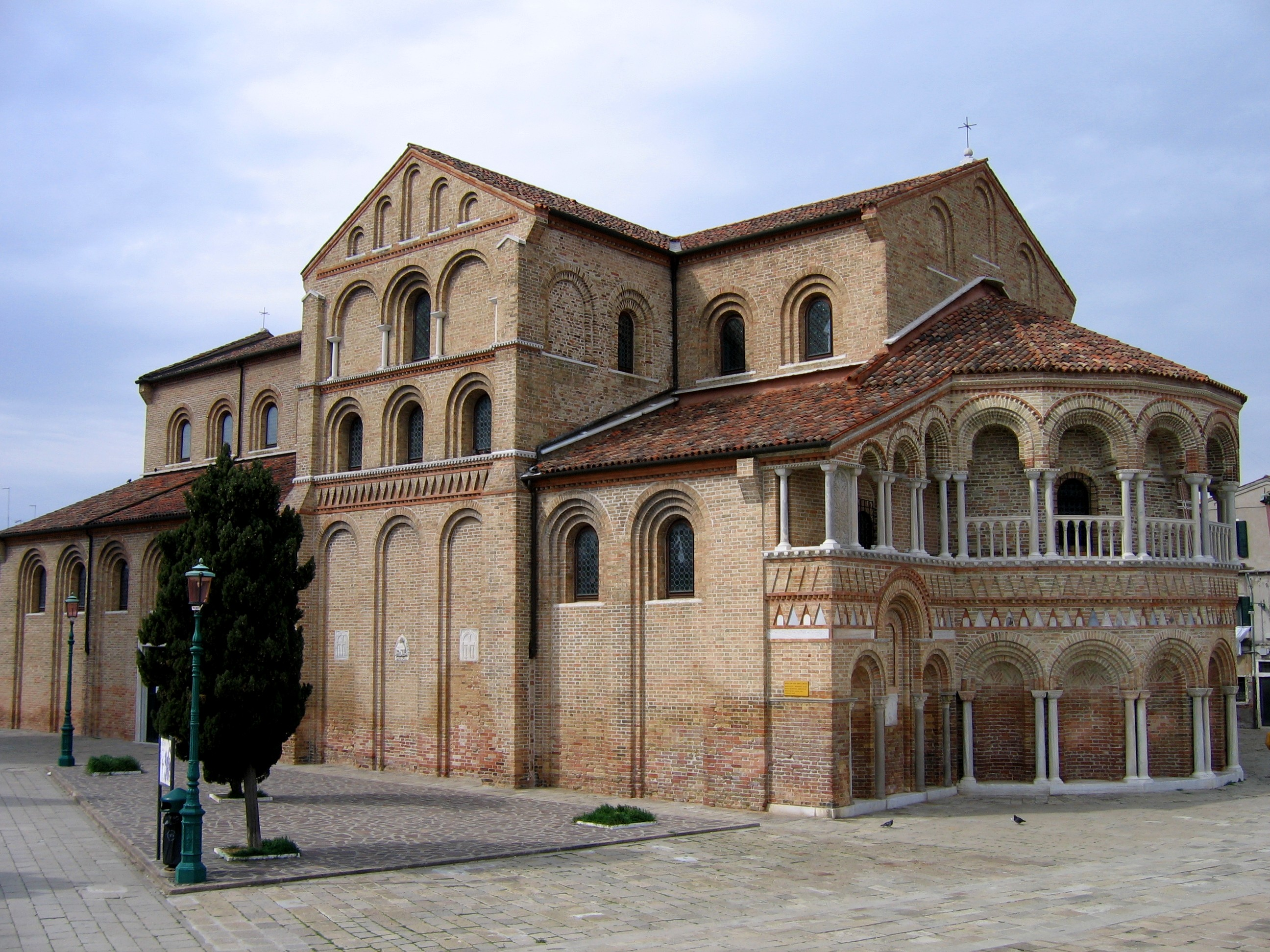 Santa Maria e San Donato a Murano (Venice).